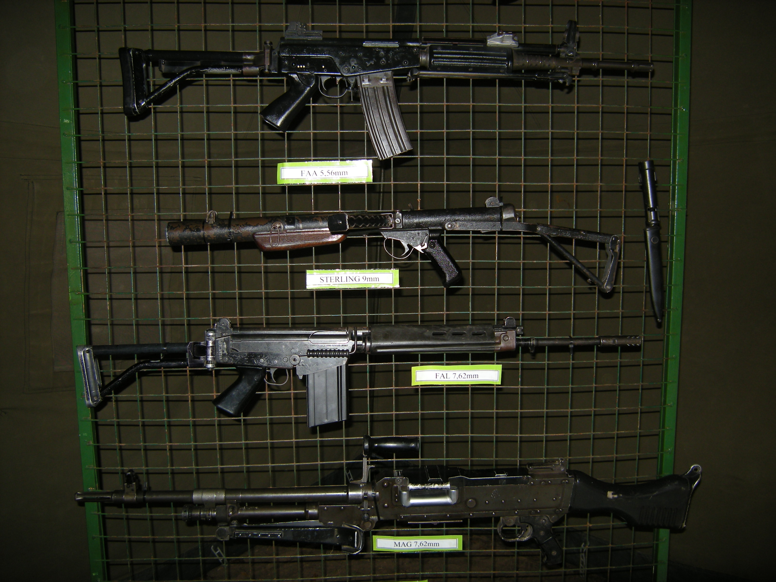 Armamento de la Infantería; de arriba hacia abajo se pueden apreciar un fusil FAA de 5,56 mm, un subfusil Sterling de 9 mm, un fusil FAL de 7,62 mm y una ametralladora MAG de 7,62 mm